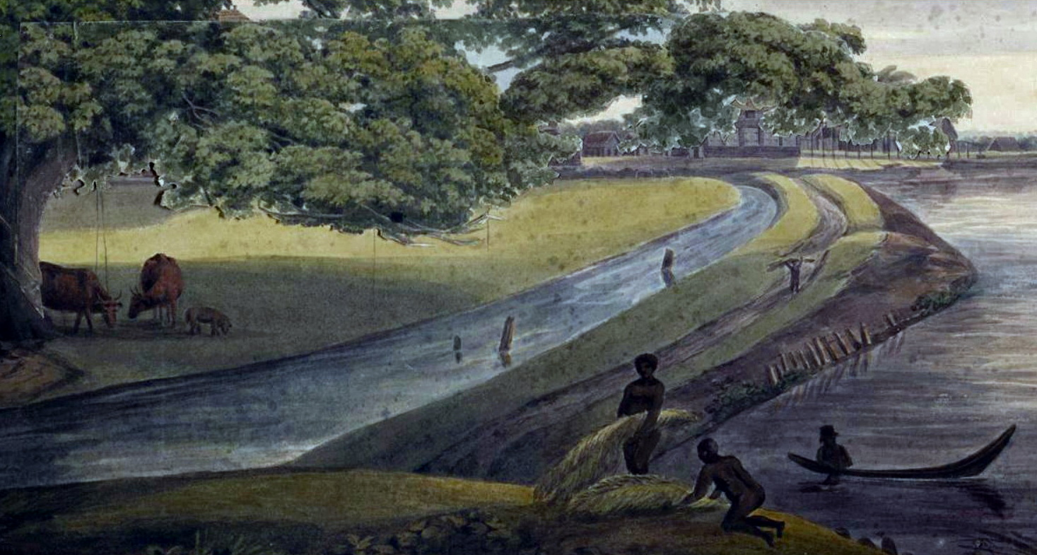 Detail van een aquarel van een landschap met een grote boom aan de Commewijnerivier in Suriname (waarschijnlijk plantage Alkmaar), geschilderd door Louise van Panhuys tijdens haar verblijf in Suriname als echtgenote van een plantagehouder (1811-1816). Opvallend is de "reparatie" van dit deel van de aquarel, waarbij de boomtakken een eerdere versie bedekken, die waarschijnlijk meer plantagegebouwen toonde. Collectie Universiteitsbibliotheek Frankfurt am Main.